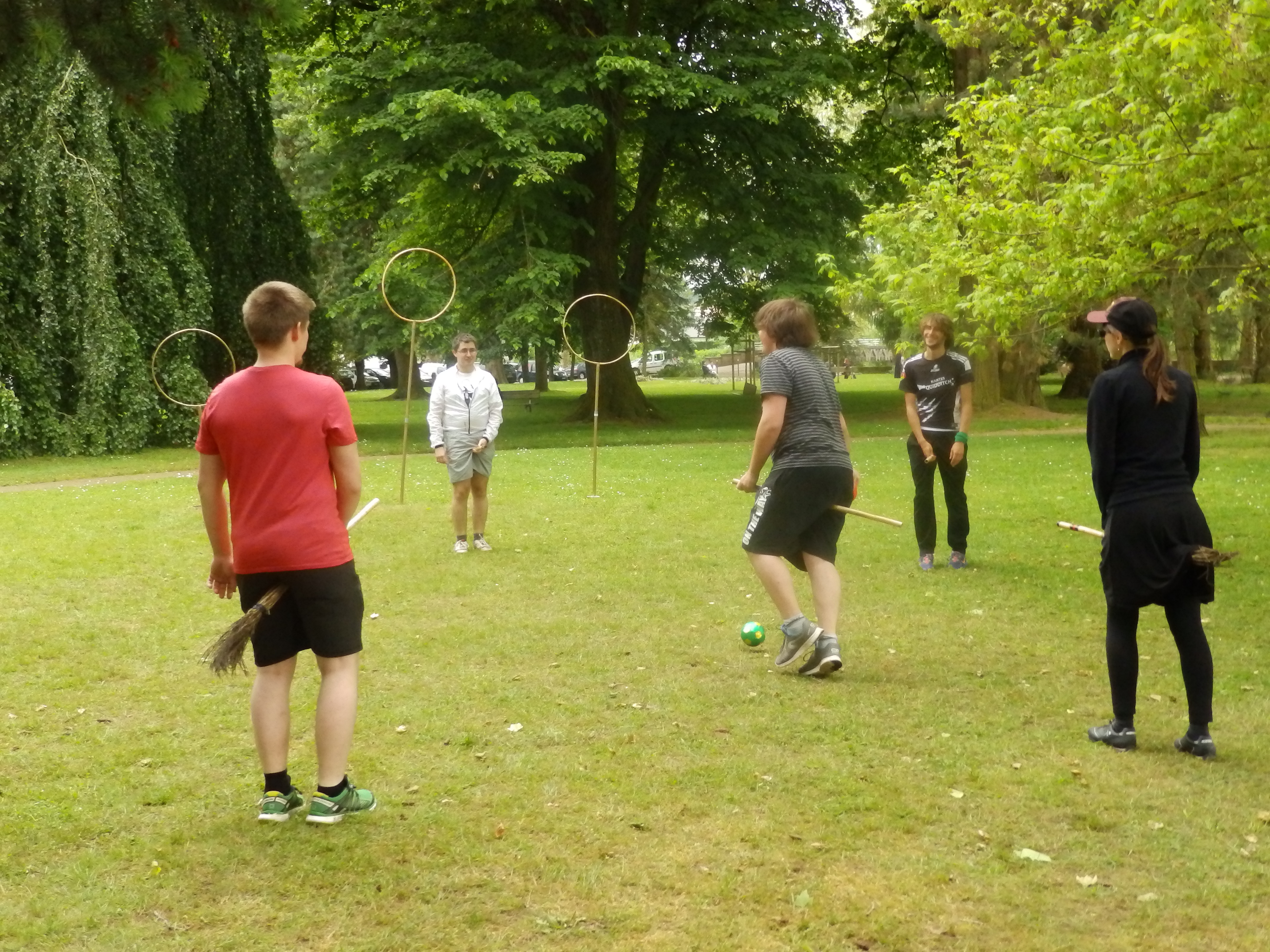 Démonstration de quidditch par l'association Lorraine quidditch lors de la 15ème édition du festival des mondes imaginaires Les Imaginales, à Épinal (département des Vosges, en France) en mai 2016.